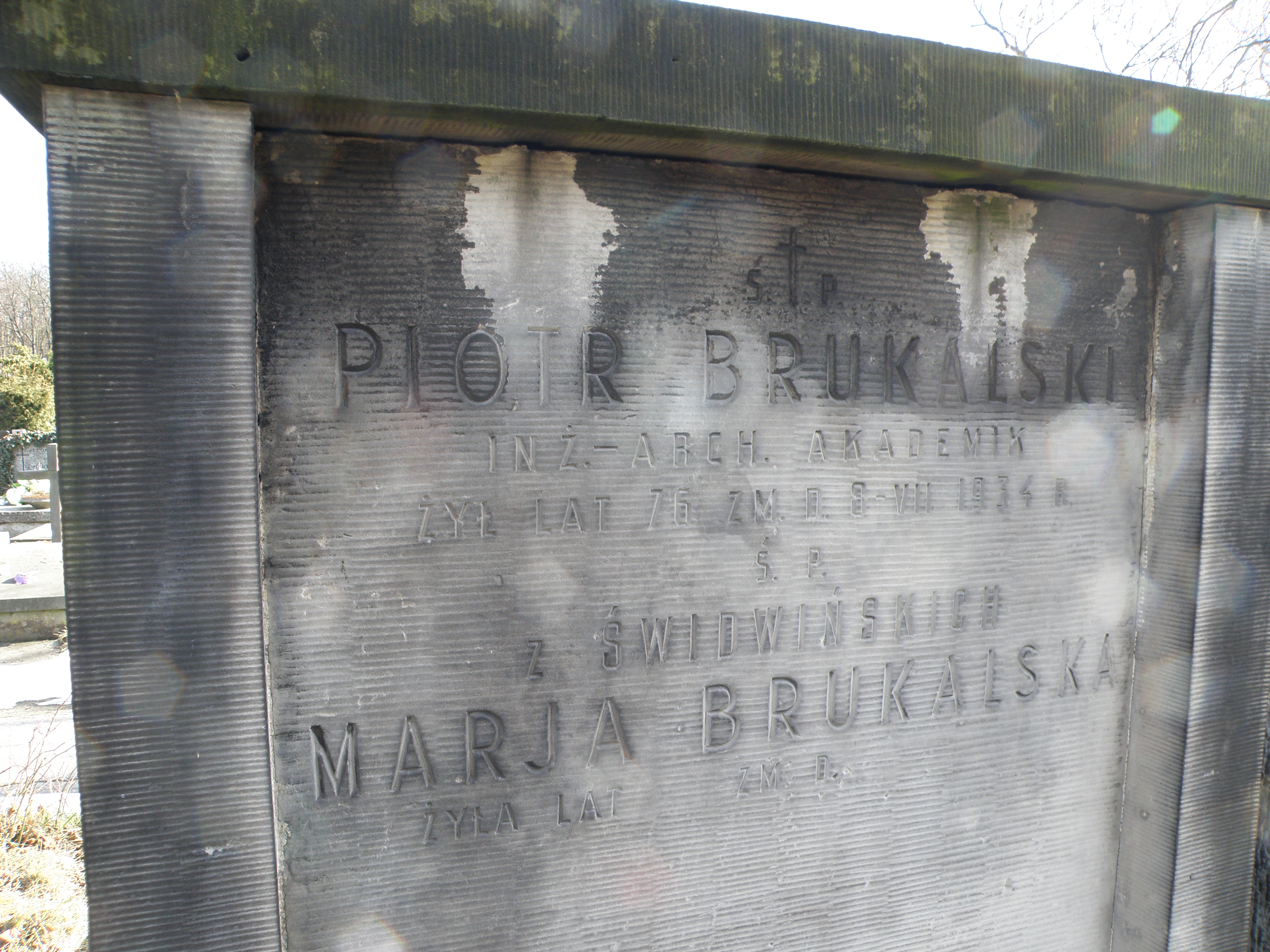 Warszawa, Cm. powązkowski, Tablica z grobu Piotra Brukalskiego 1934 r. kwatera c, rząd 2, miejsce 11.